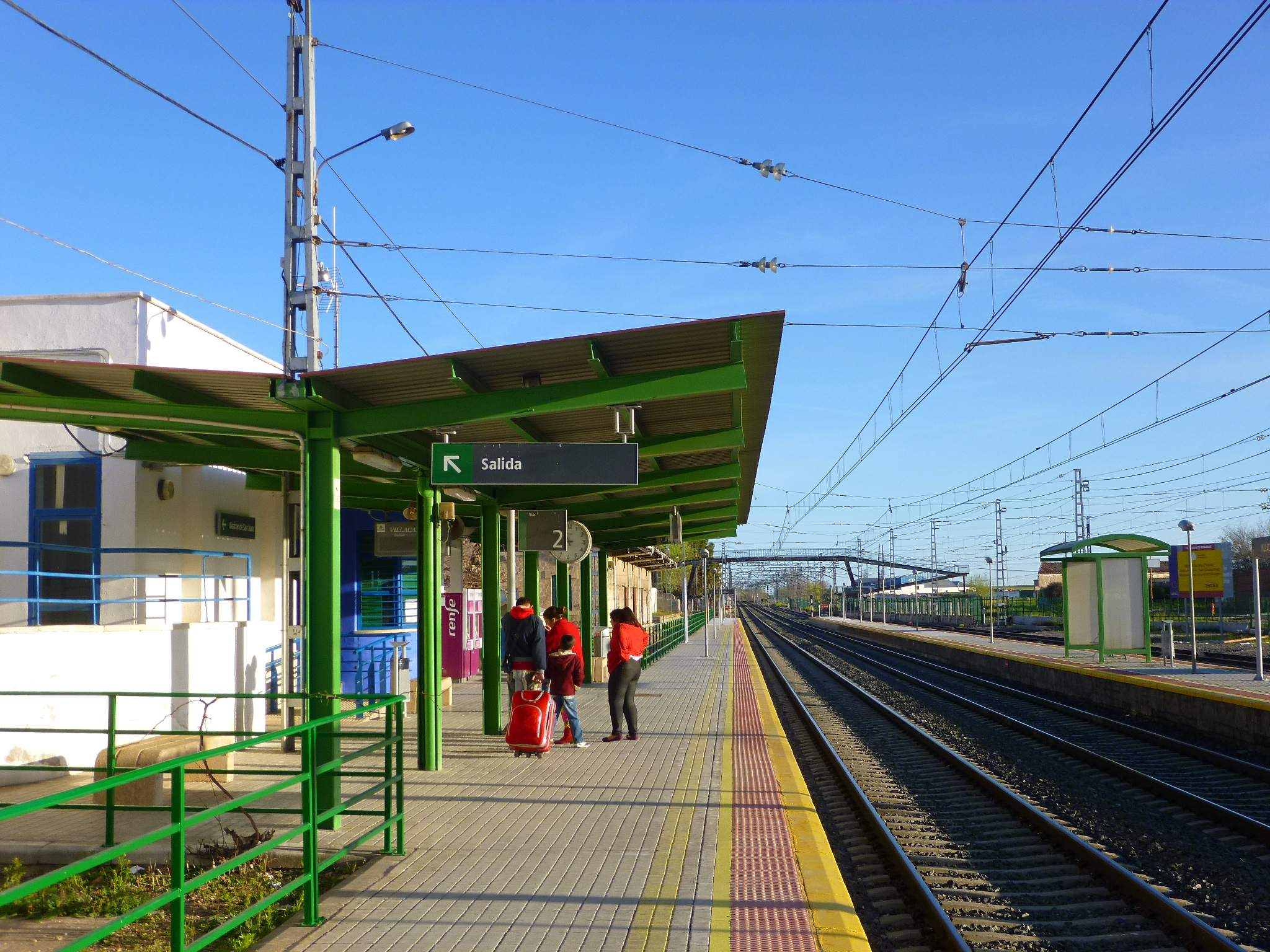 Villacañas - Estación de ADIF